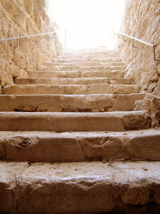 main staircase to Hezekiah's Tunnel המדרגות היורדות למעיין הגיחון ונקבת השילוח